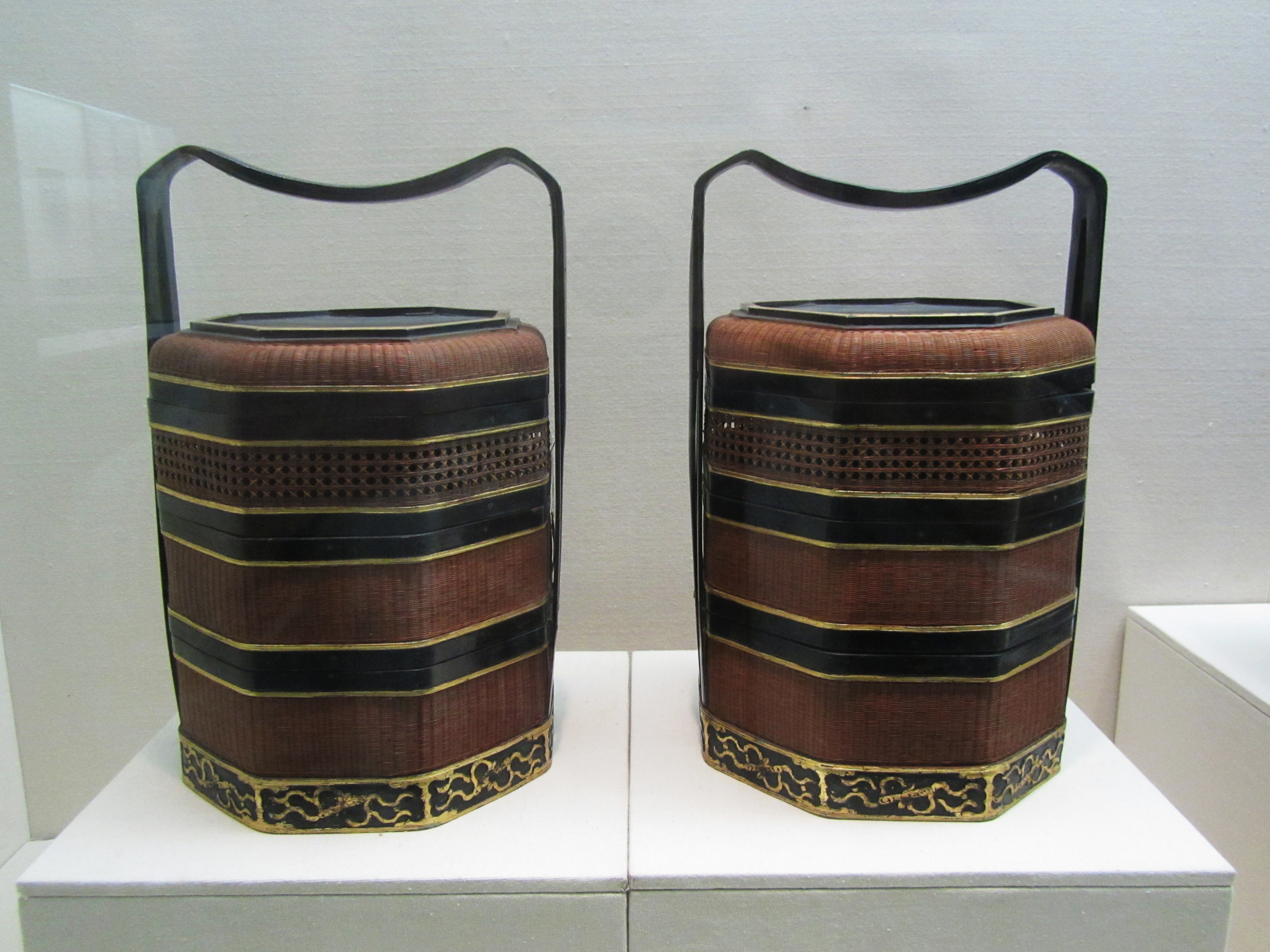 嵊州竹编绍兴八角三格提篮，20世纪50年代。